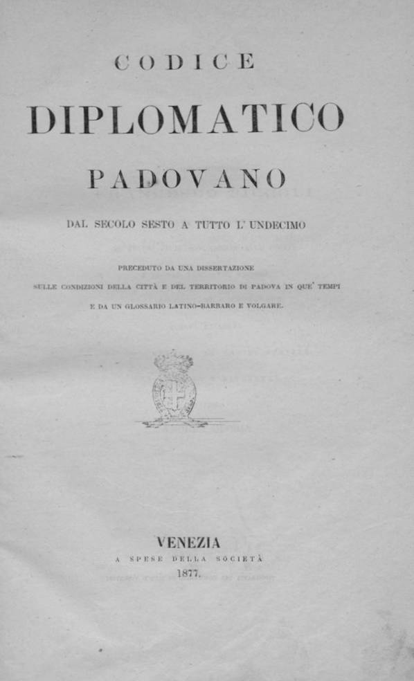 Frontespizio